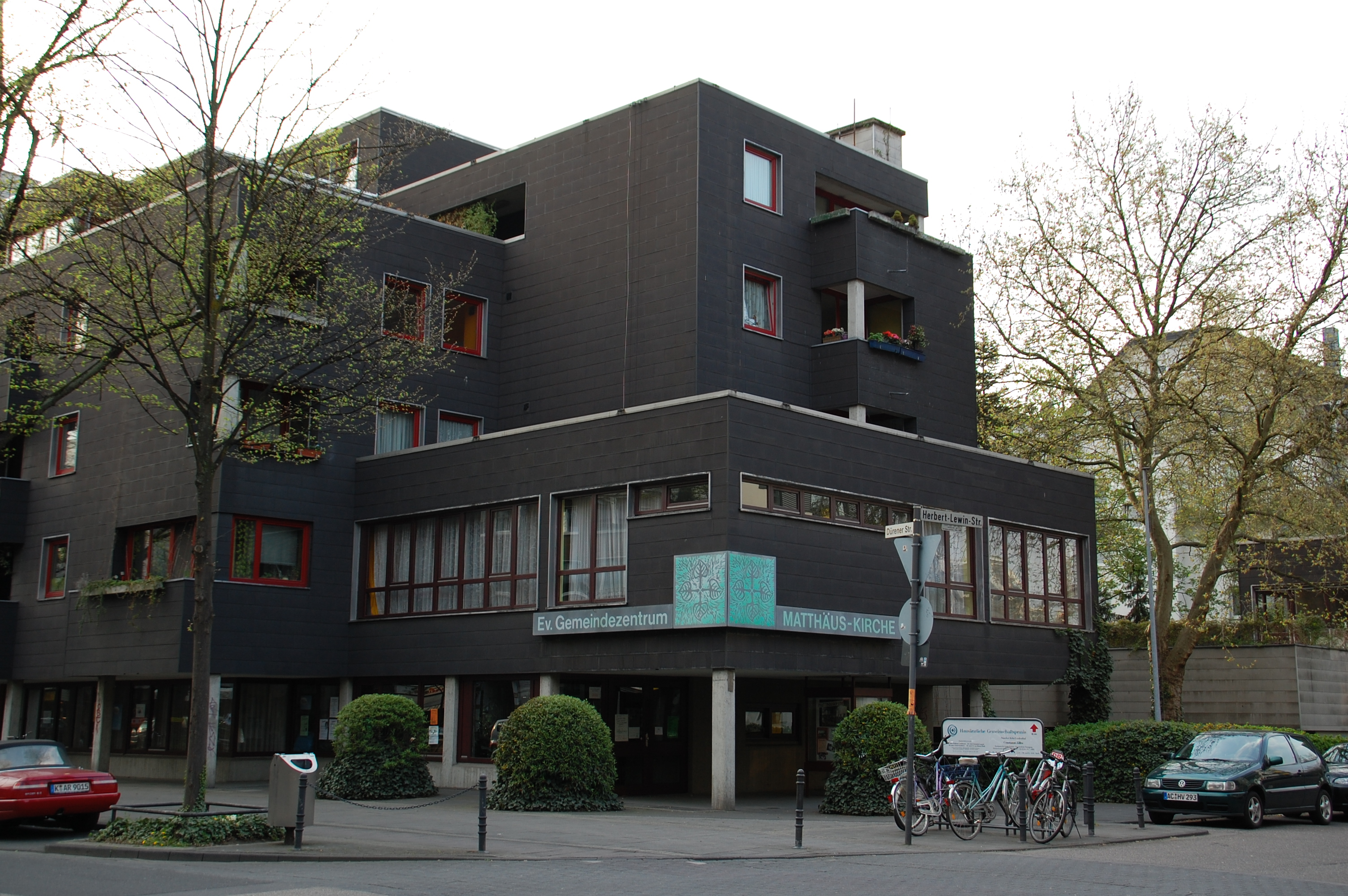 Matthäus-Kirche Lindenthal, Cologne, Germany